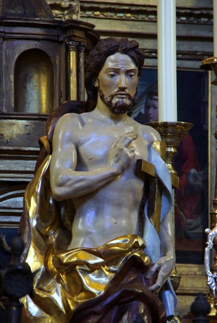 Stmo. Cristo Resucitado de Málaga.